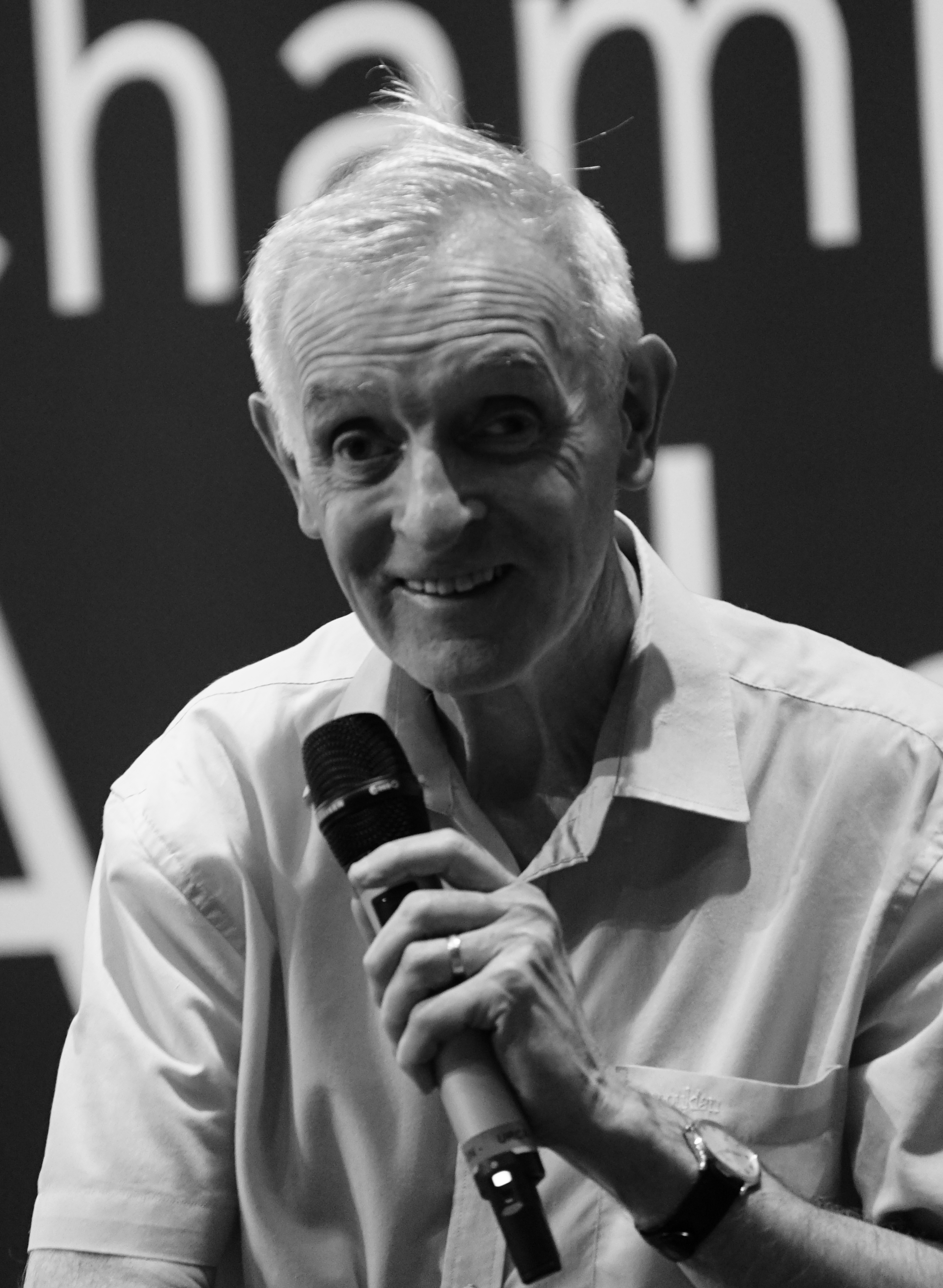 Jean Jouzel en conférence à Reims.